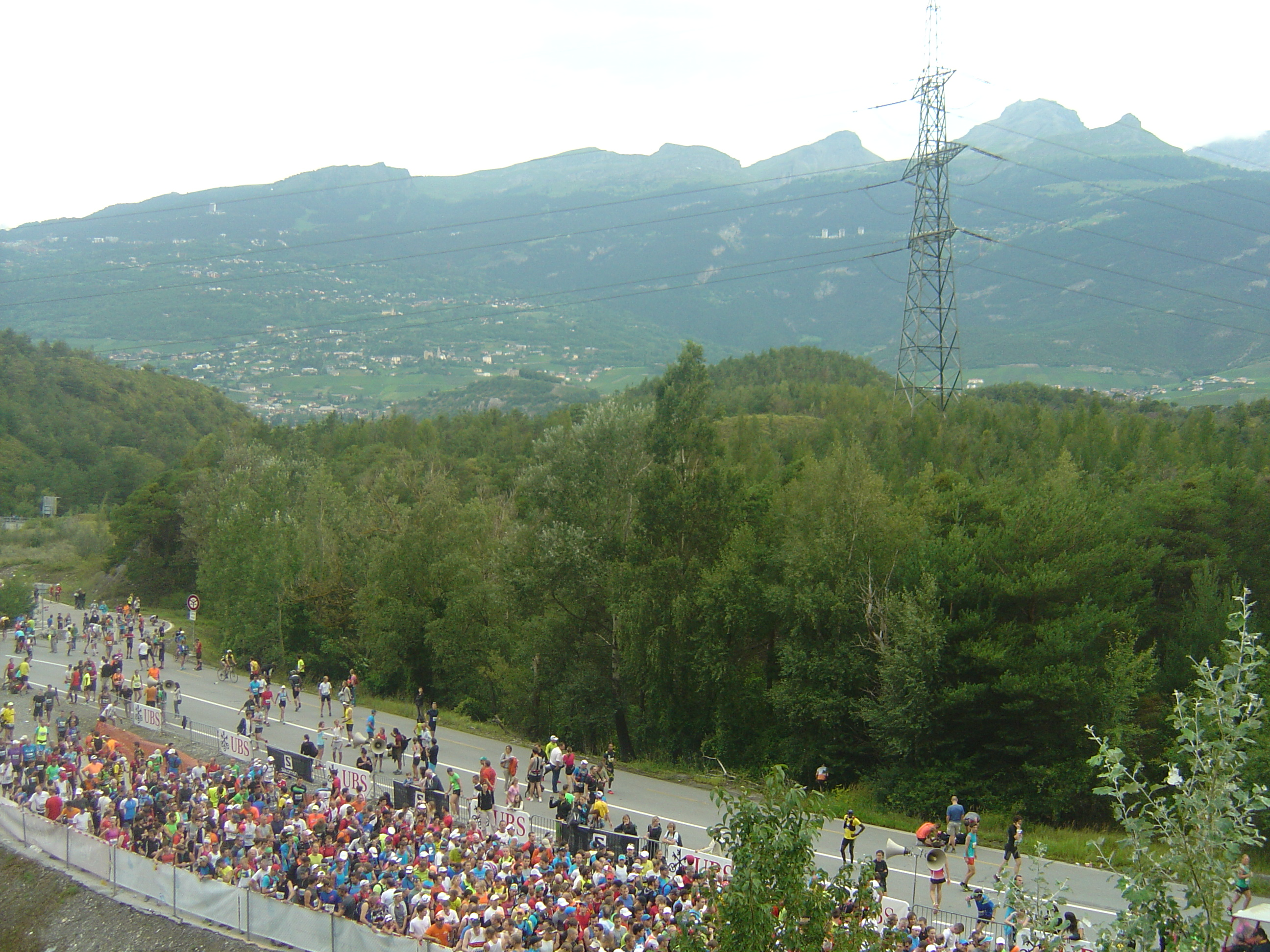 Concurrents à quelques minutes du départ de la course Sierre-Zinal 2014